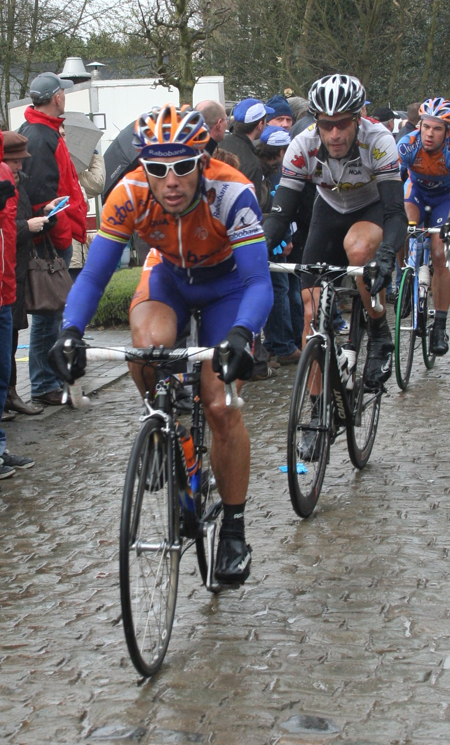 Oscar Freire hier met George Hincapie en Martijn Maaskant op de Kwaremont in de Ronde van Vlaanderen 2008